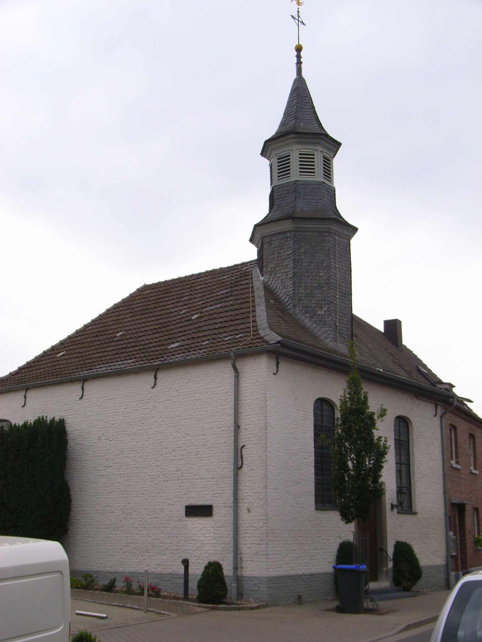 Evangelische Kirche Randerath, erbaut 1717; Kreis HS, NRW